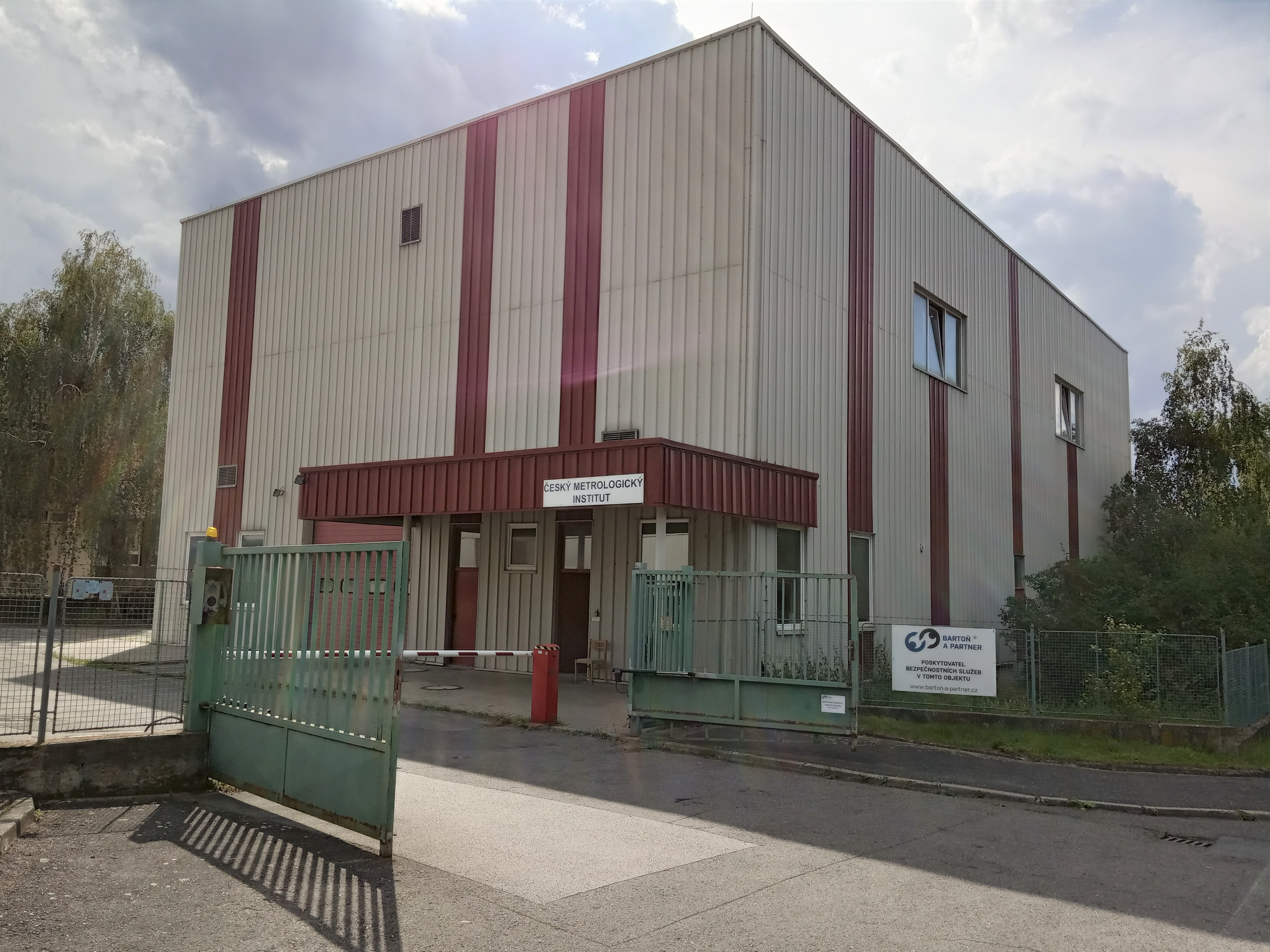 Praha - Chodov, Hvožďanská 3, Český metrologický institut